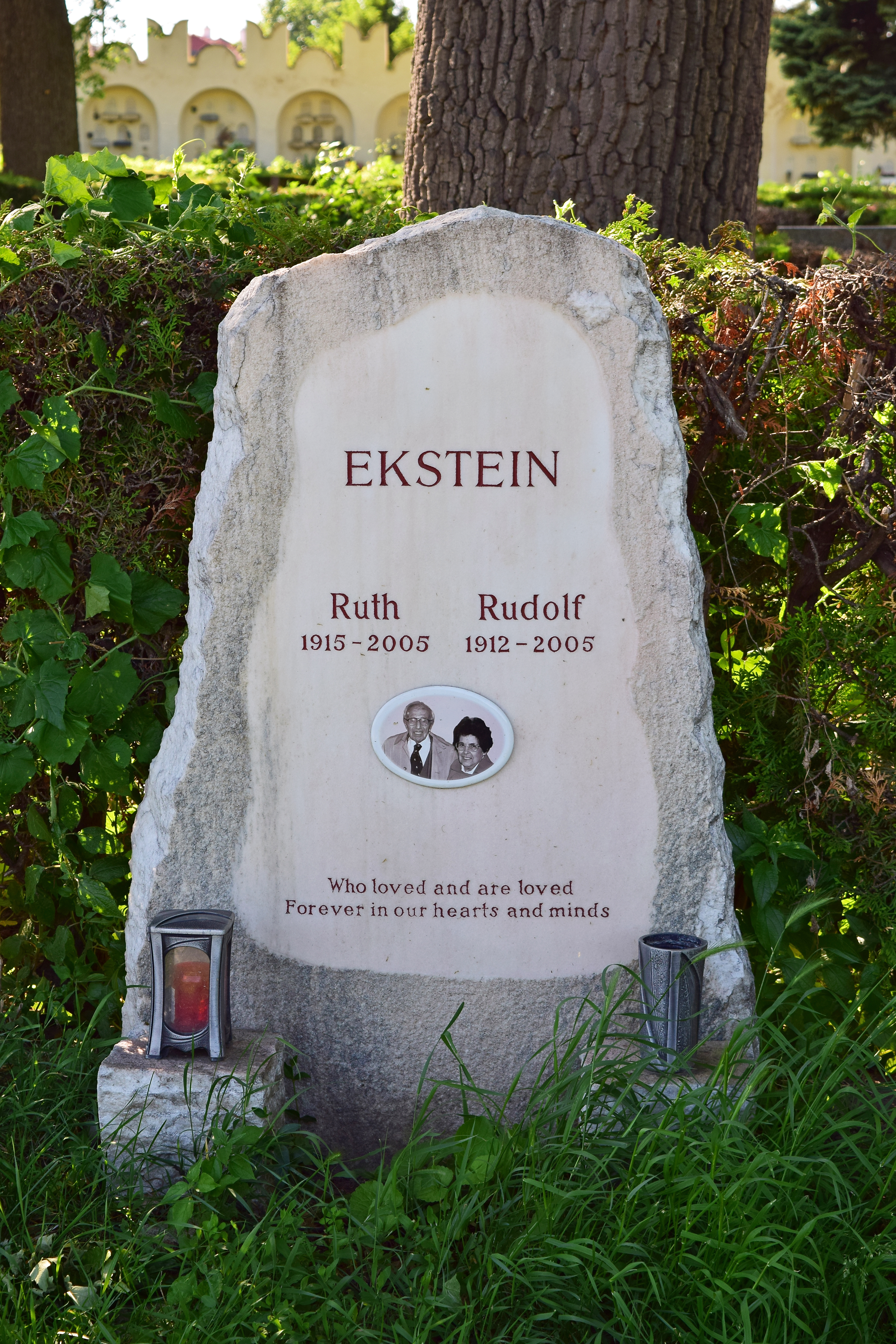 Ehrenhalber gewidmetes Grab von Rudolf Ekstein auf dem Urnenhain der Feuerhalle Simmering, Gruppe 1, Abt. 7, Ring 3, Nr. 15